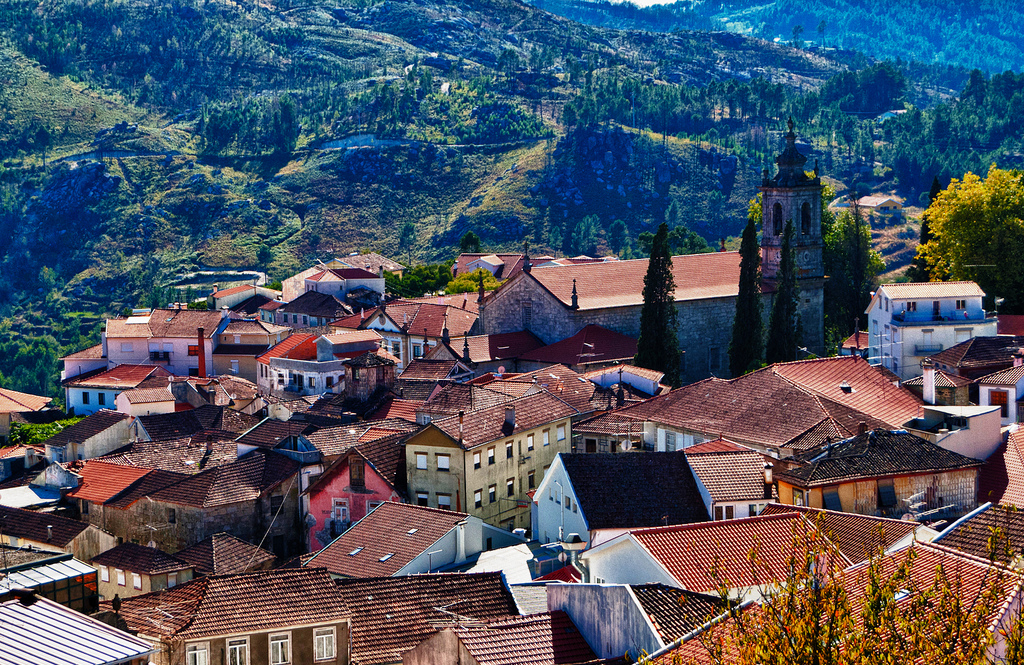 Castro Daire